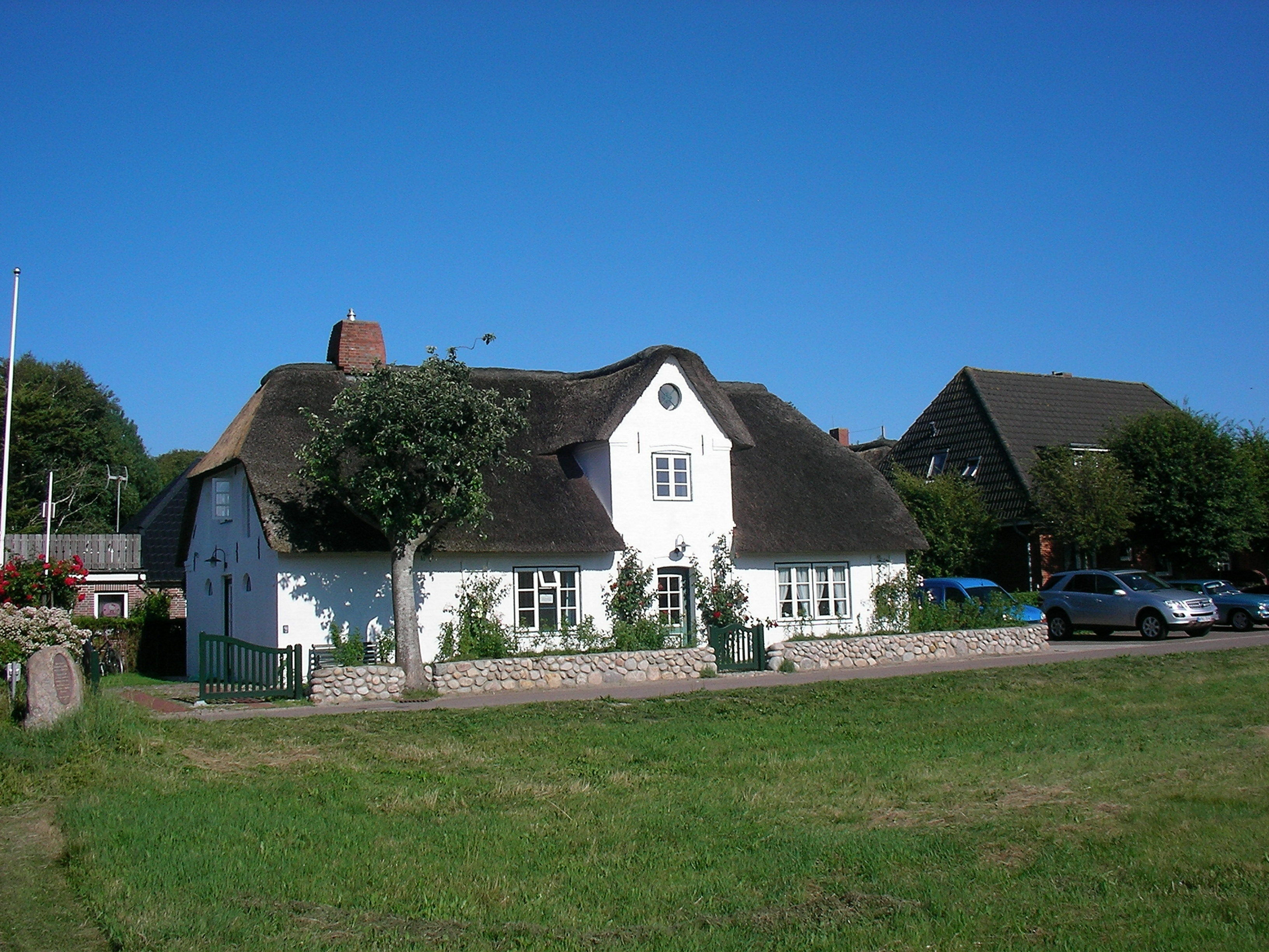 Midlum